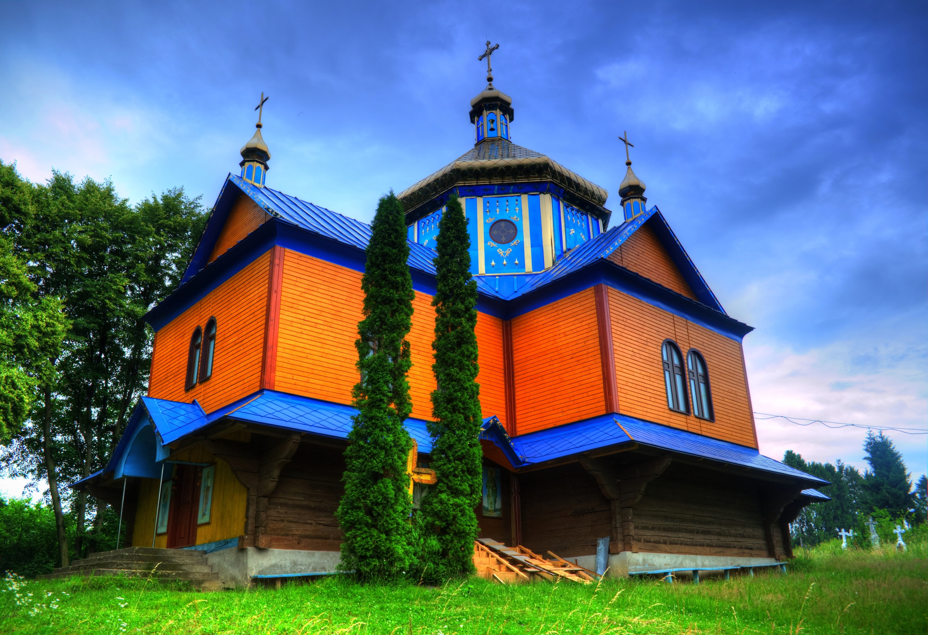 Церква в с. Старе Село Жидачівський район